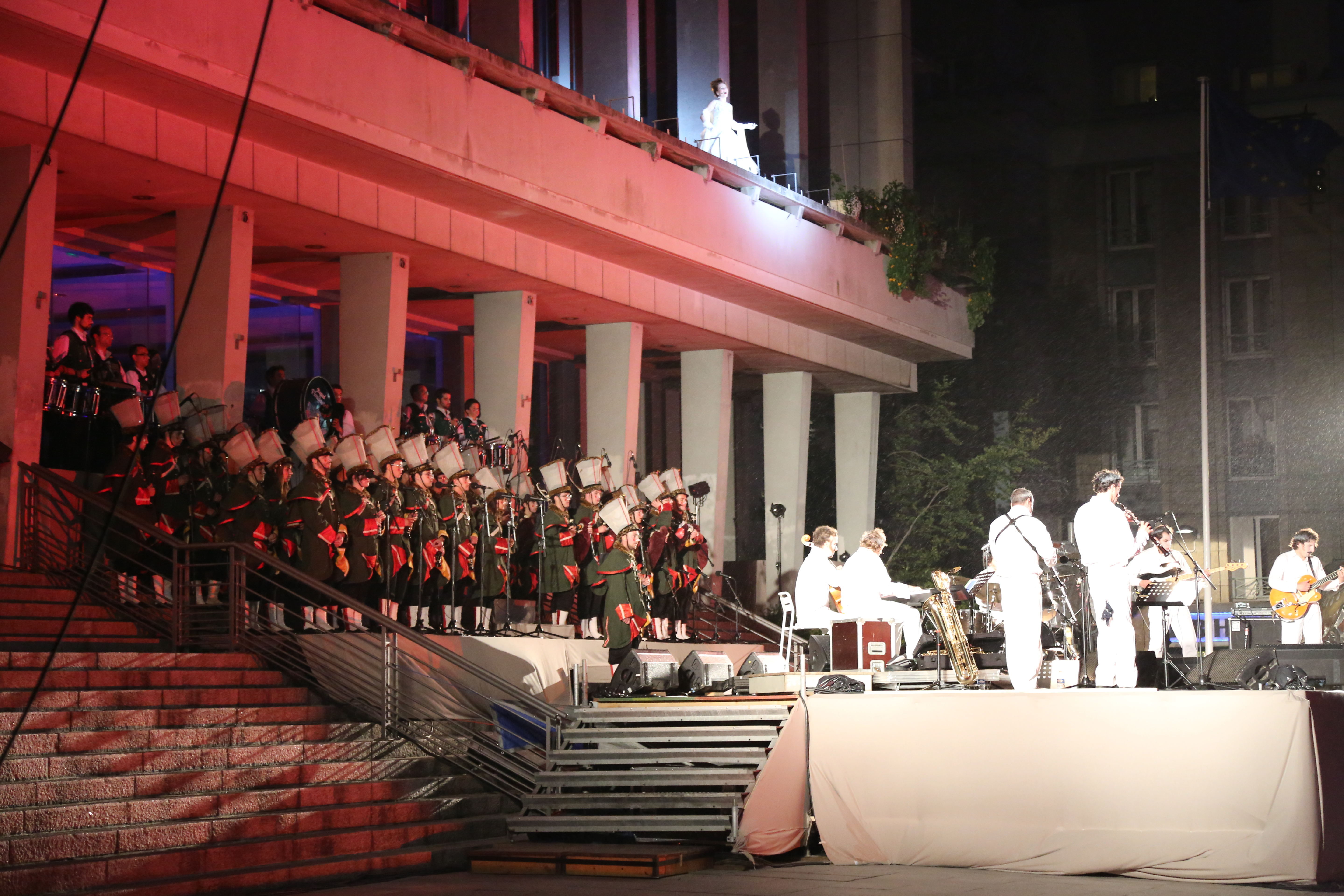 Photos autour de l'inauguration du Tramway à Brest le 23 juin 2012 le soir place de la Liberté